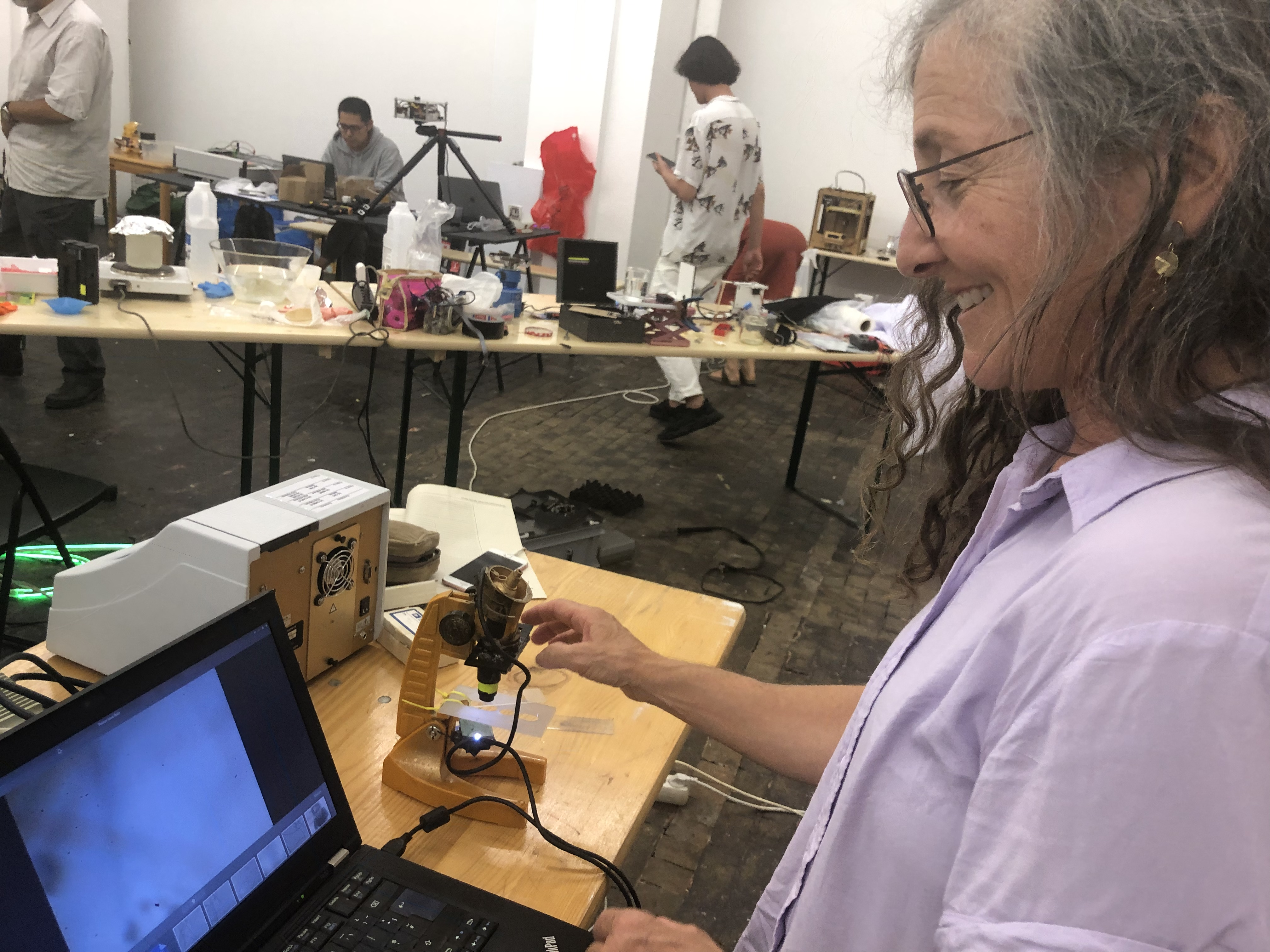 Wormolution, 1000 écologies 12 au 15 septembre 2019